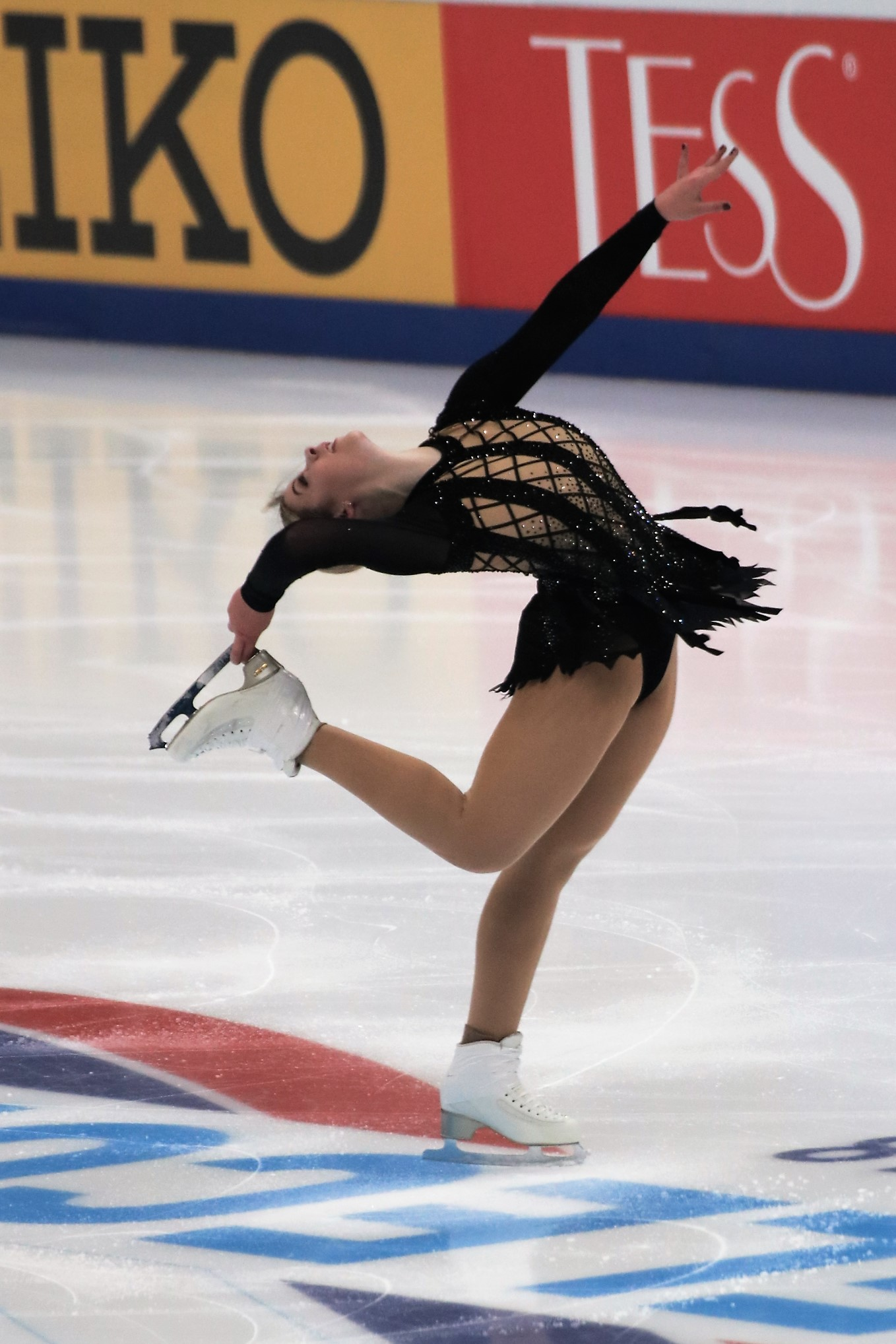 Грейси Голд (США) на Rostelecom Cup 2018